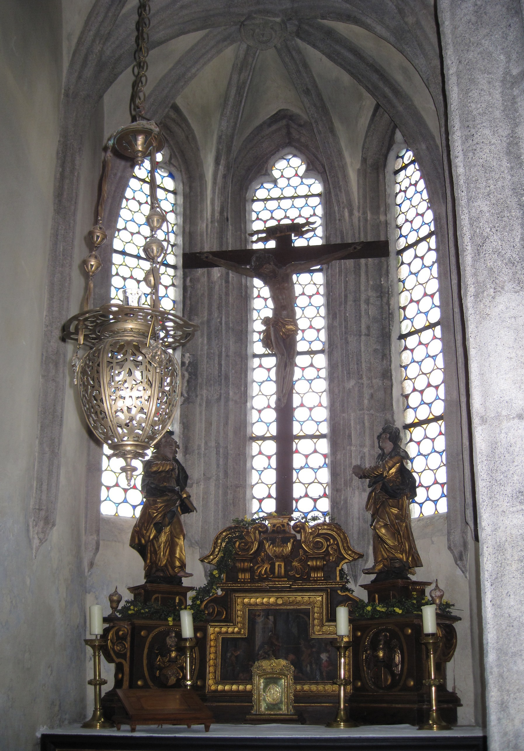 Kapelle aus dem 15. Jahrhundert der Burg Clam in Klam im Bezirk Perg in Oberösterreich.